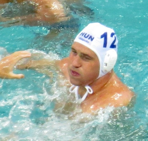 Rio 2016. Polo aquatico. sx50 57